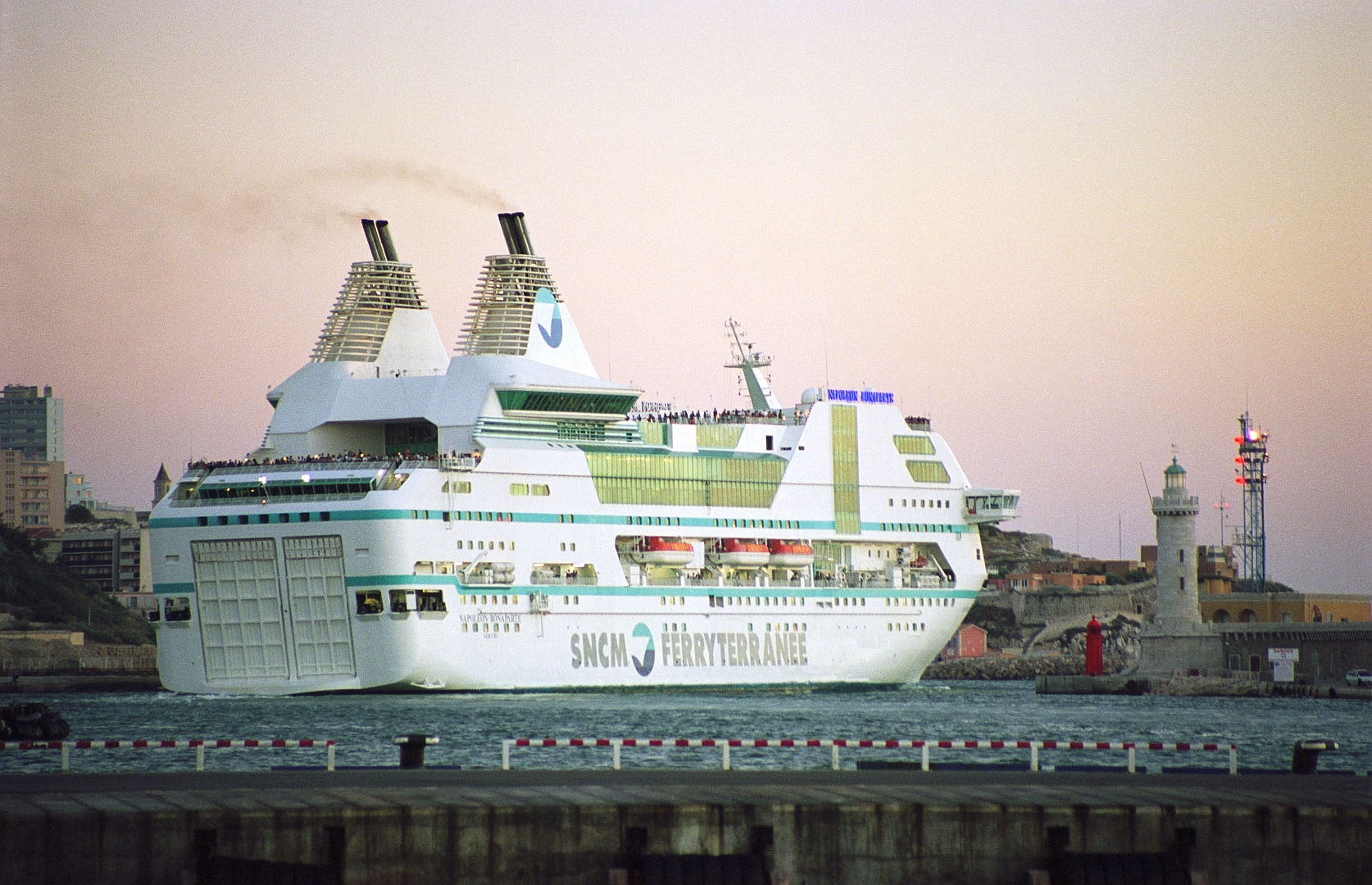 Le ferry Napoleon Bonaparte sort du bassin de la Joliette à Marseille, dans la soirée du 29 juillet 2000.